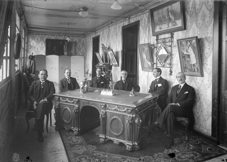 El presidente de la República del Ecuador, Alfredo Baquerizo Moreno, junto a su Gabinete de Ministros en uno de los despachos del Palacio de Carondelet (circa 1920)